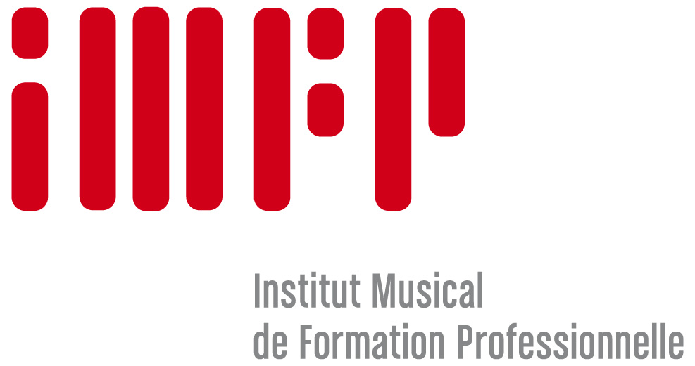 Logo IMFP